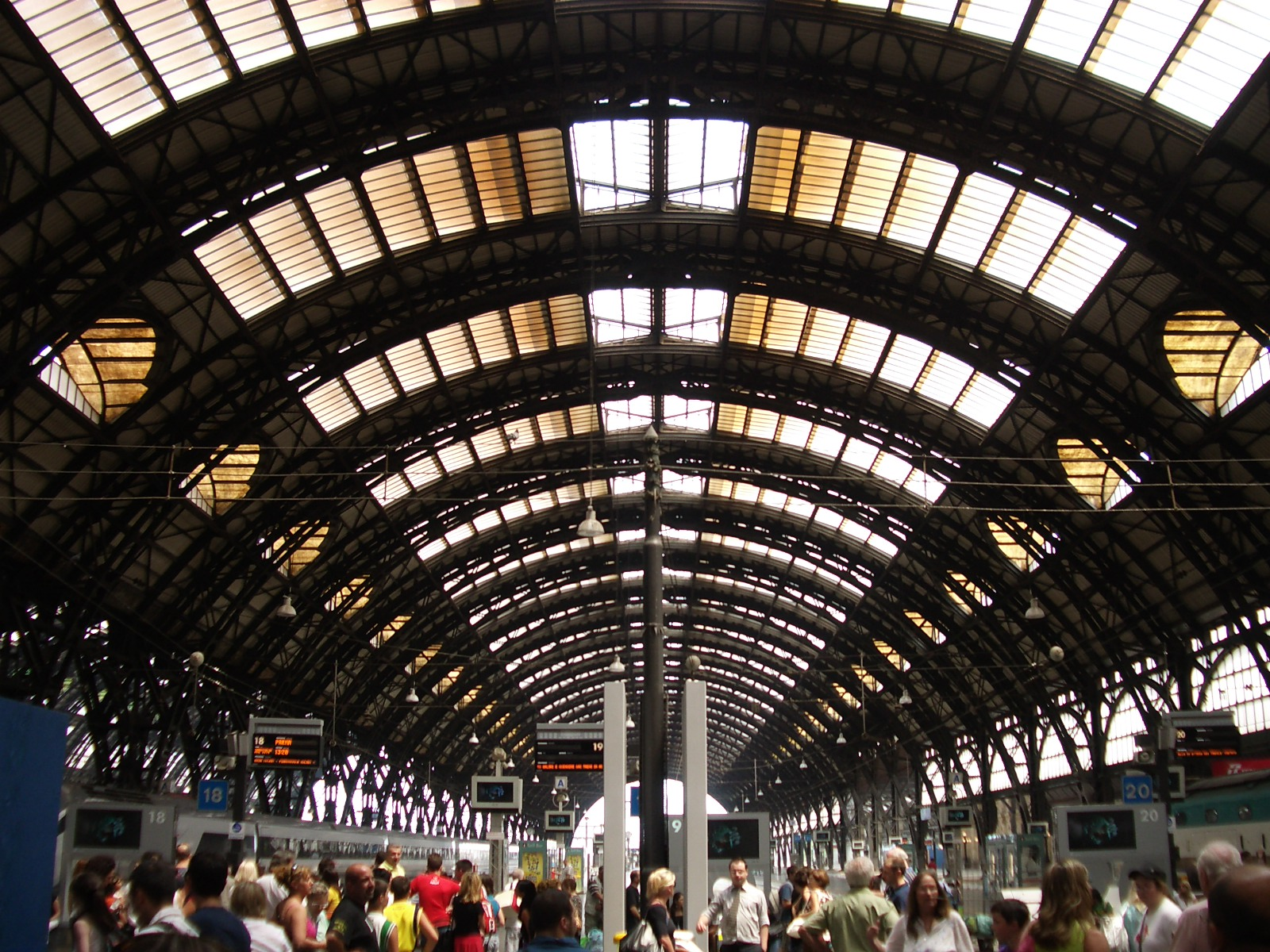 Milan, Italy